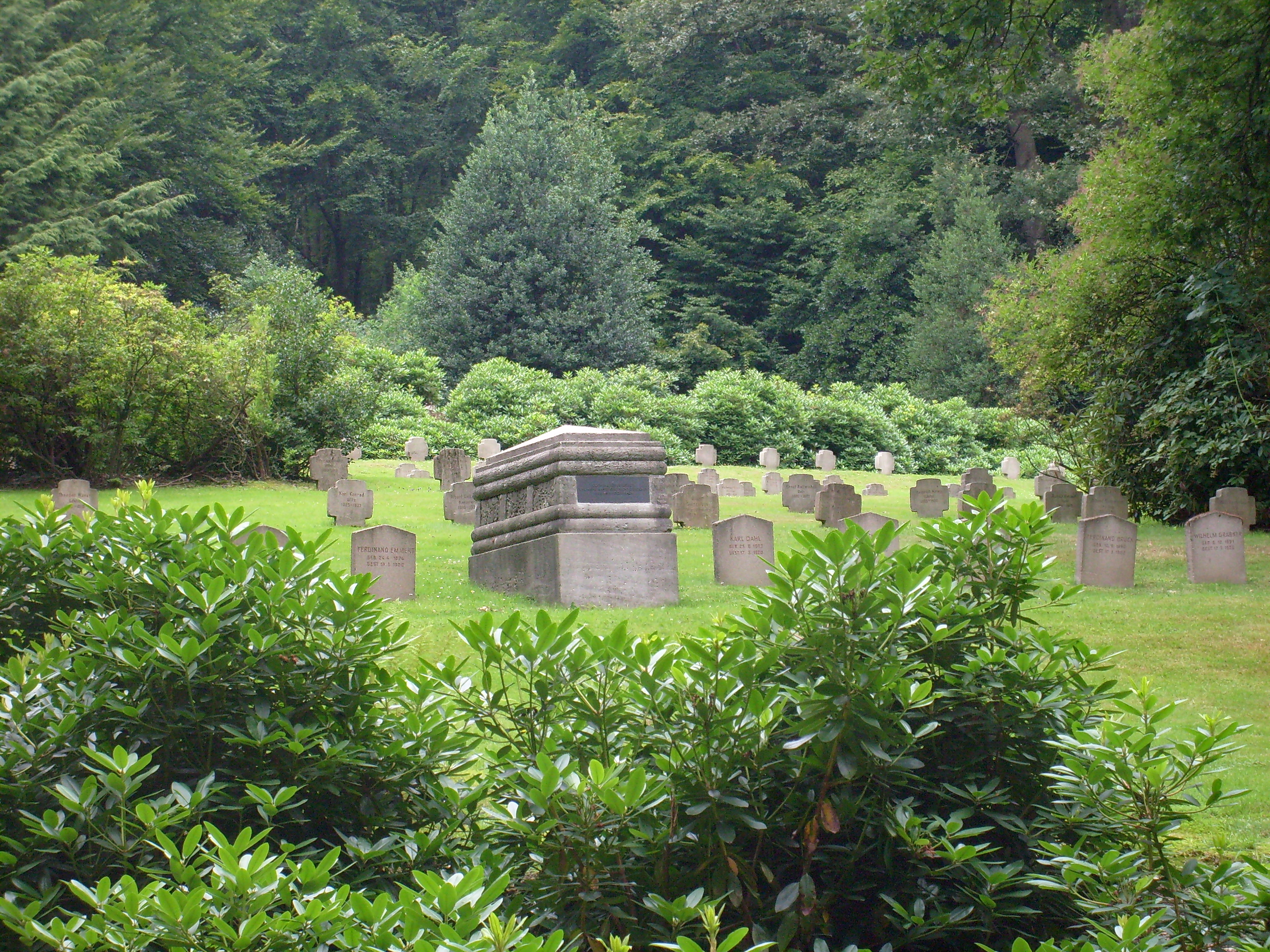 Gräberreihe der Opfer des Kapp-Putschs mit Sarkophag auf dem Ehrenfriedhof Königshöhe in Wuppertal-Elberfeld